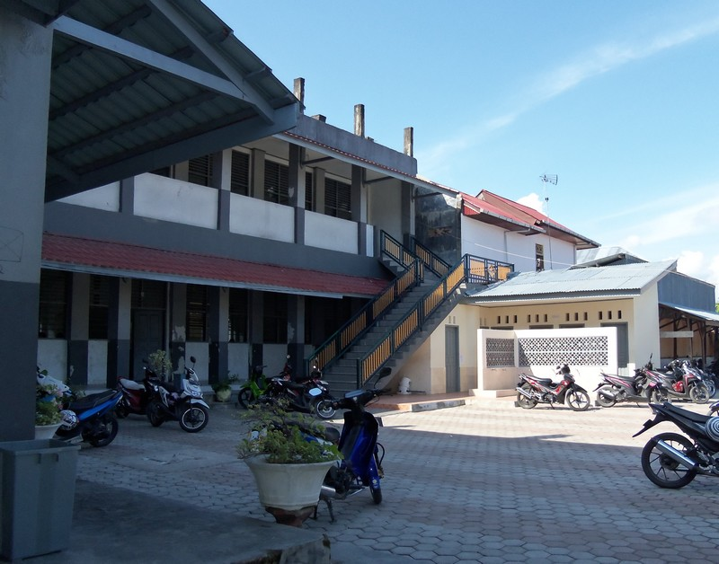 Salah satu gedung sekolah